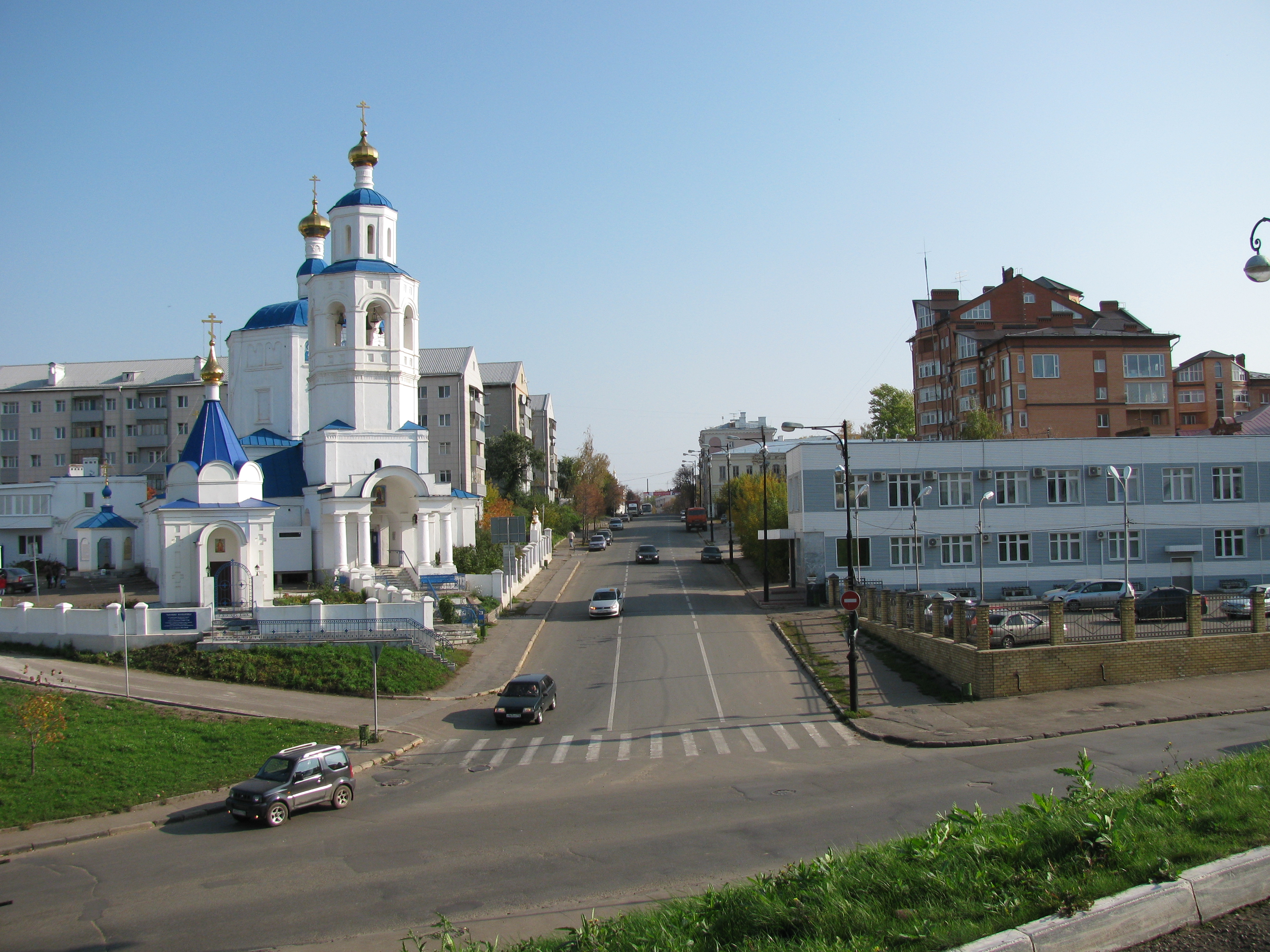 Улица Большая Красная